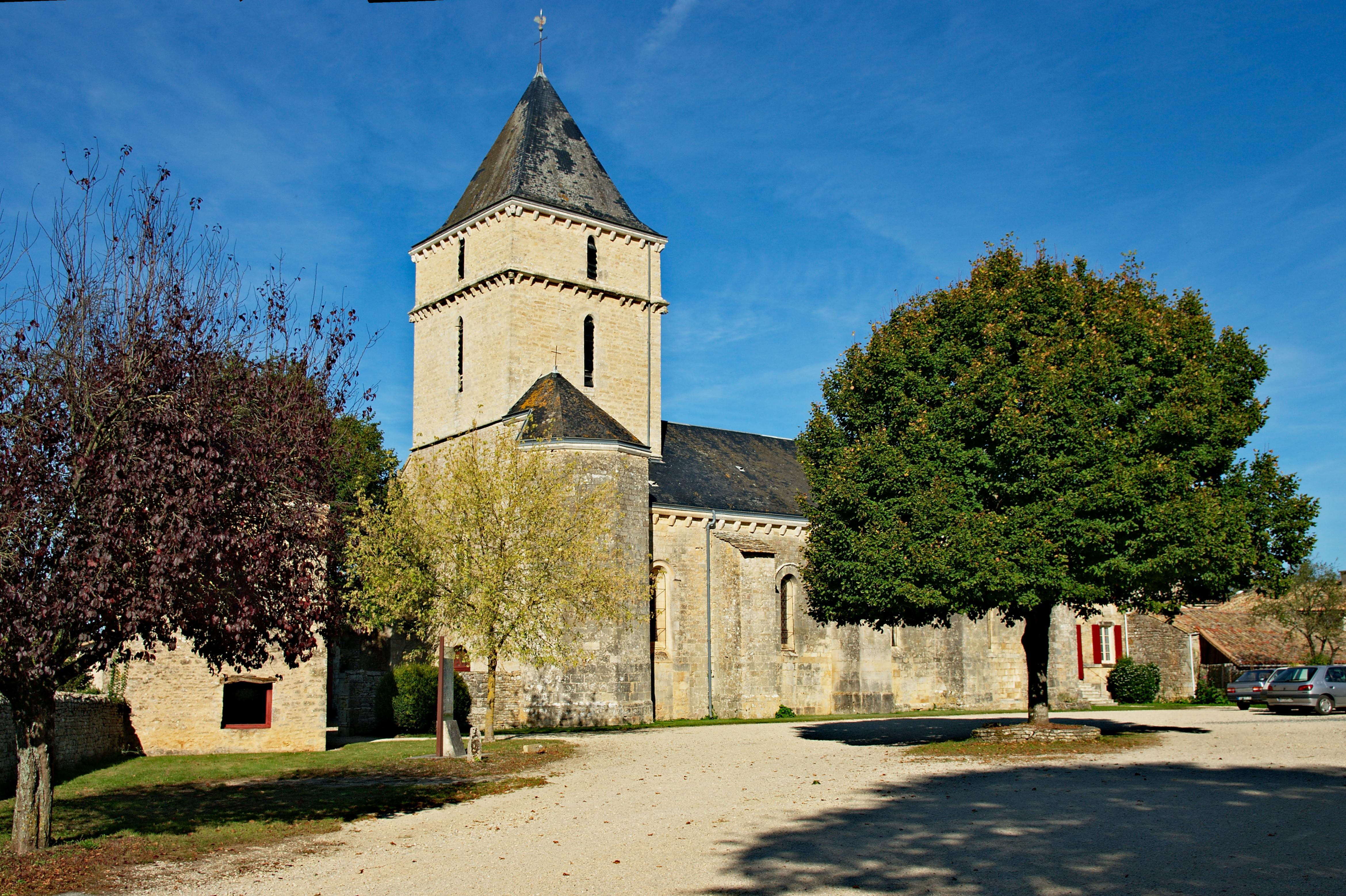 Église Saint-Maixent de Sainte-Soline